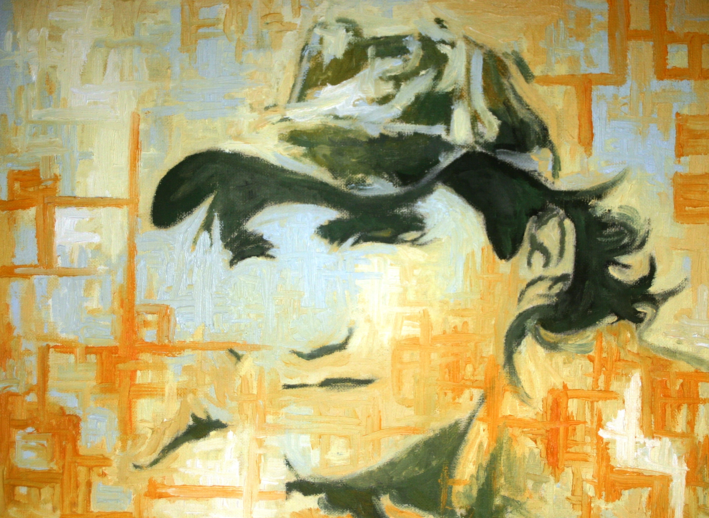 Vári Zsolt önarckép